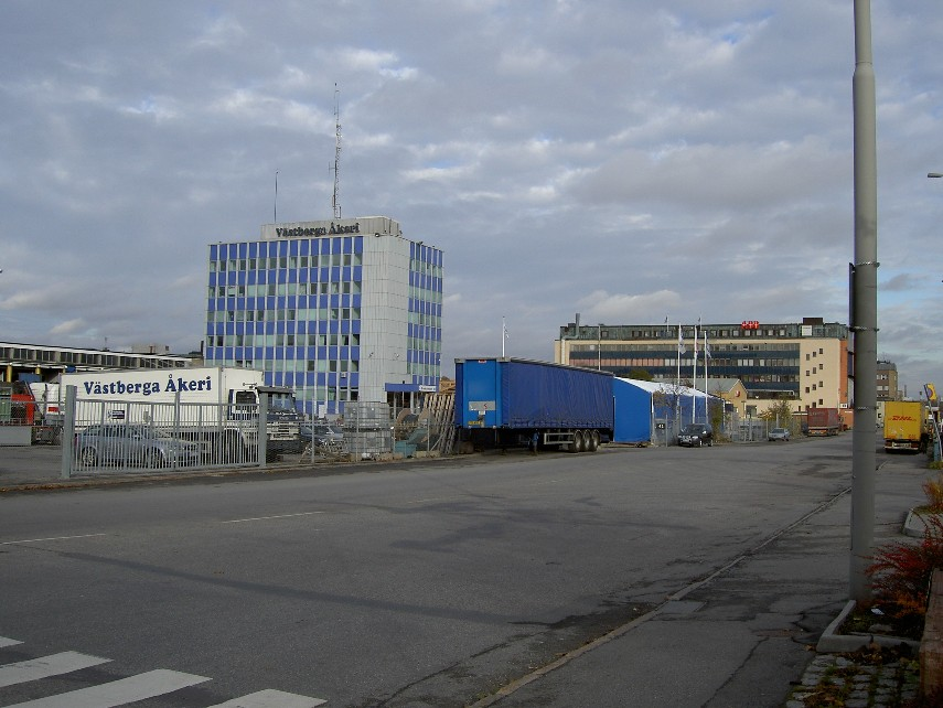 Västberga Åkeri sett från Drivhjulsvägen